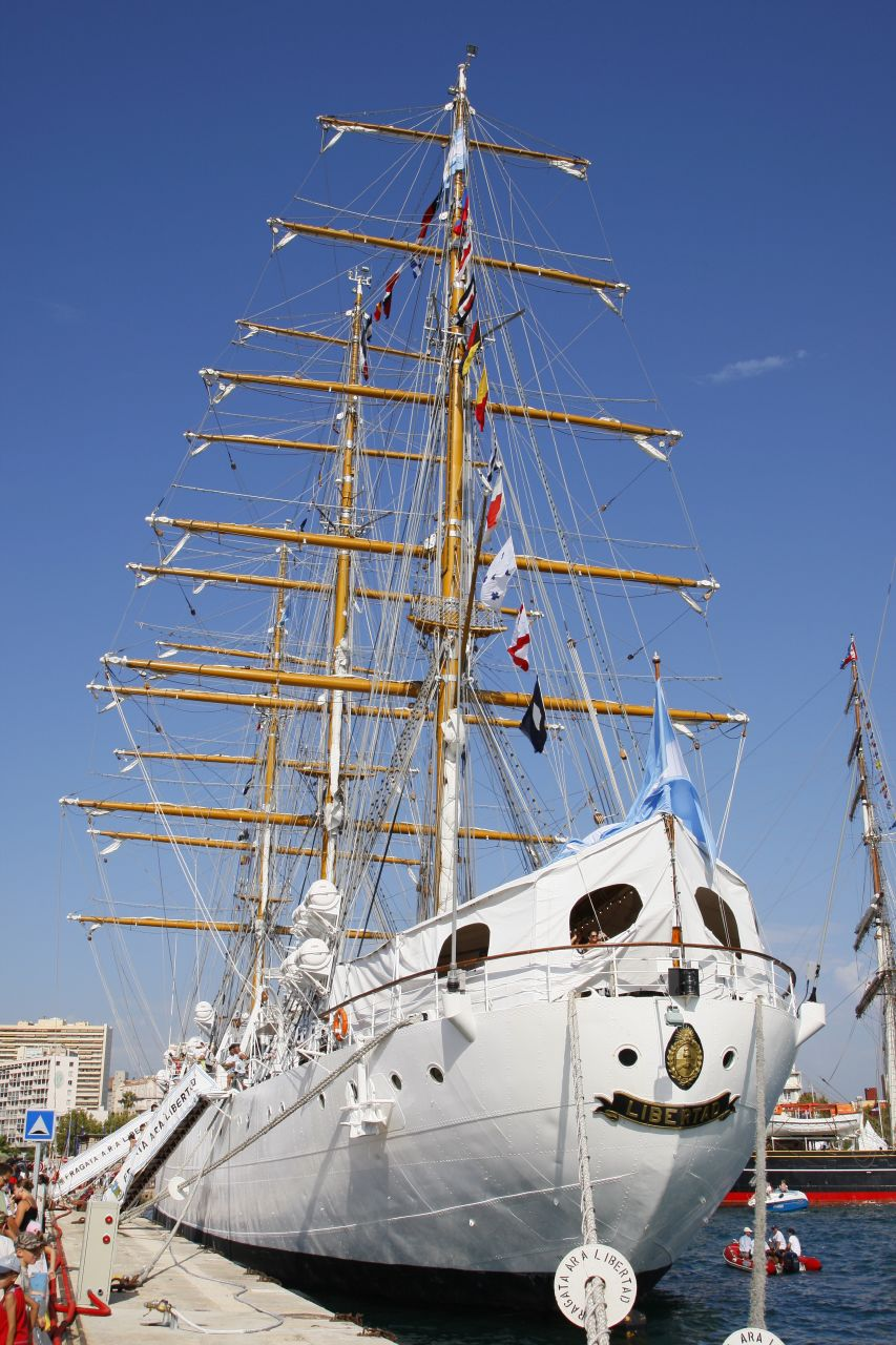 Le Libertad , trois-mâts carré argentin (1956) Taken in Le Mourillon, Toulon, Provence-Alpes-Cote d'AzurTall Ships Races 14